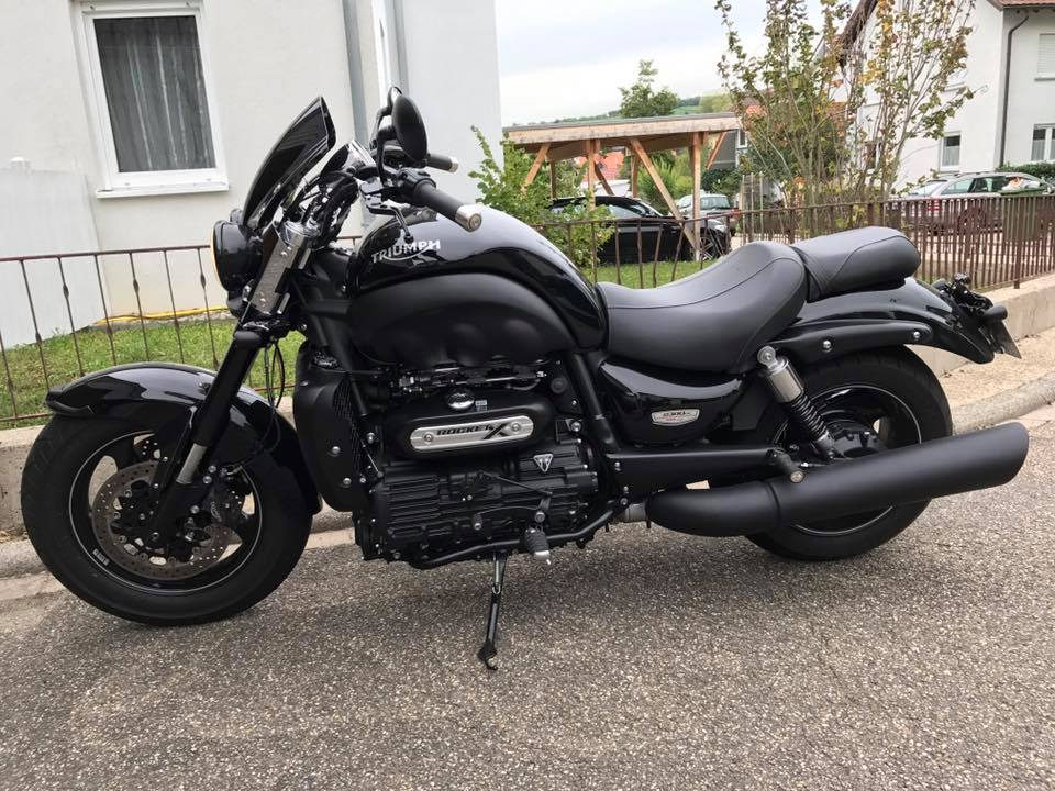 RocketX, 2015